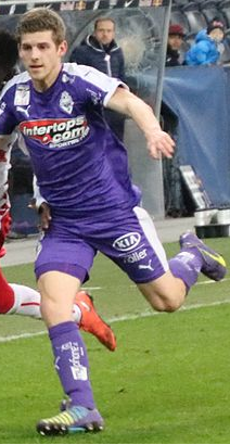 Simon Sommer